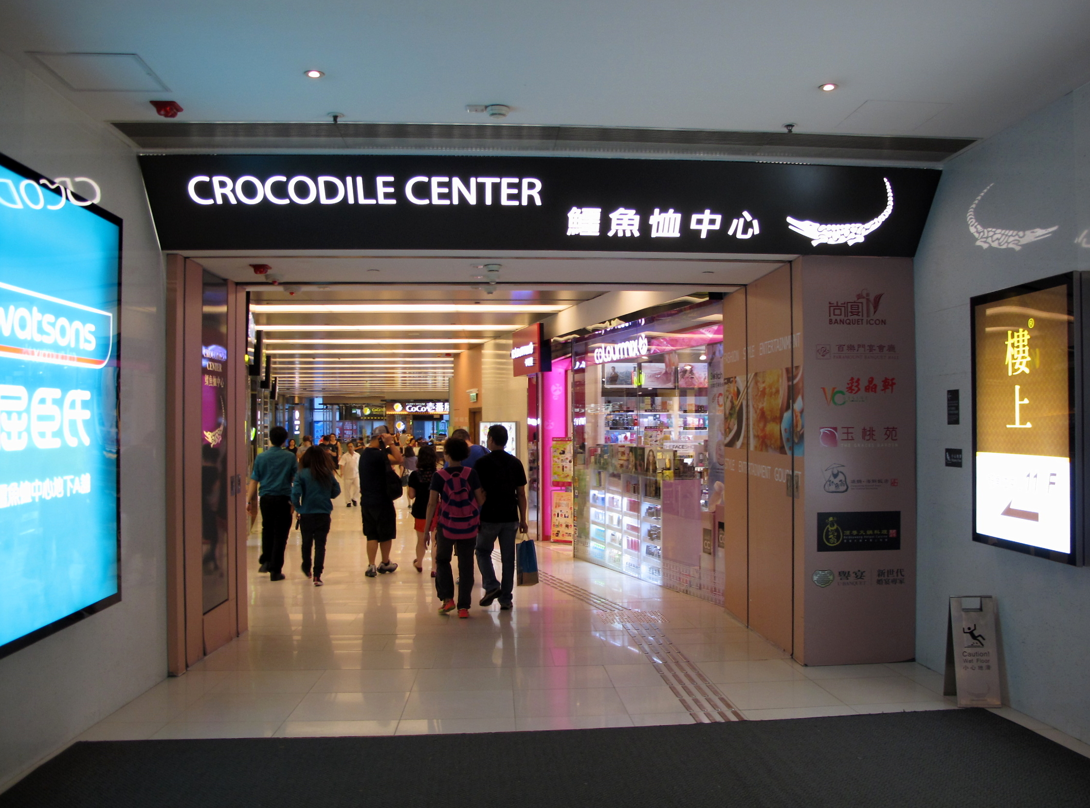 Crocodile Center Level 1 Entrance